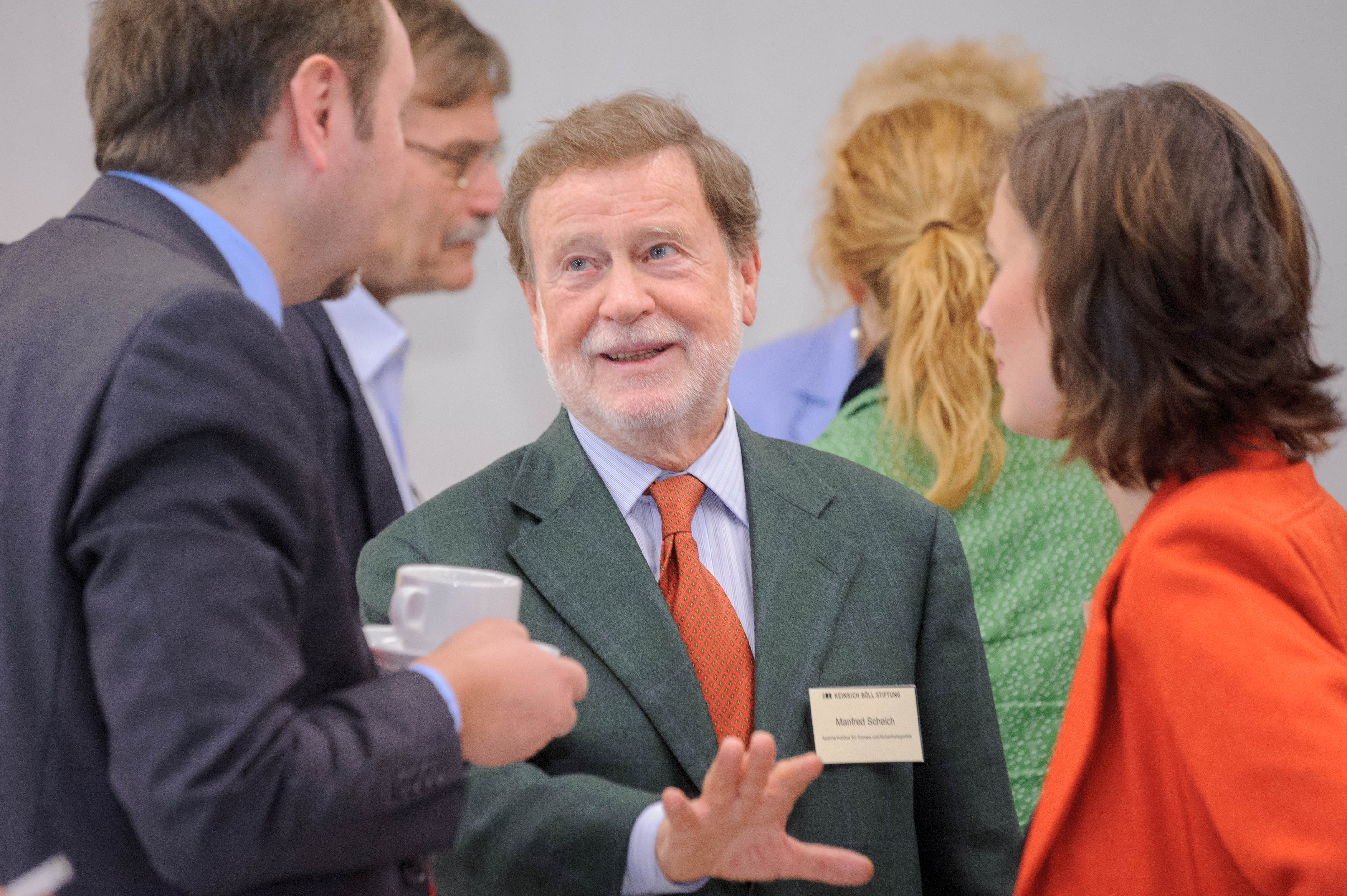 Manfred Scheich, ehemaliger österreichischer Botschafter